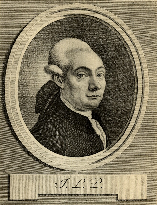 Portrait von Jakob Ludwig Passavant.